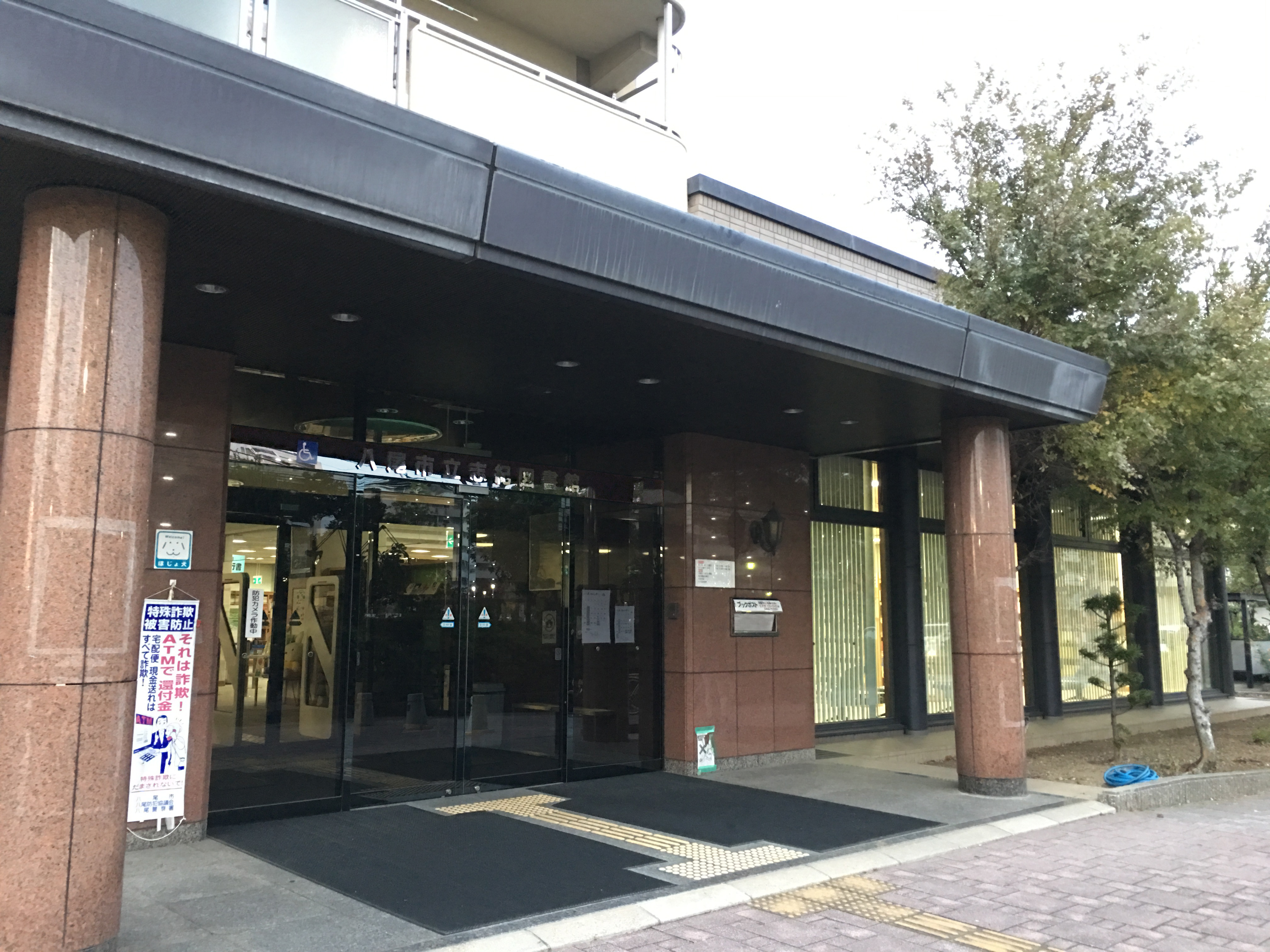 八尾市立志紀図書館